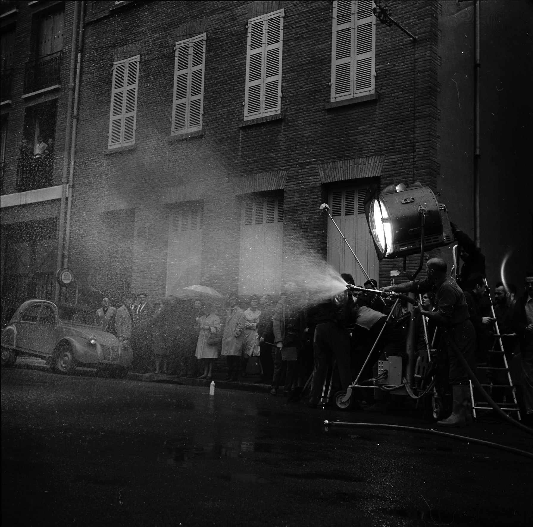 Rue de Toulouse. Le 2 novembre 1965. Tournage du film "La Bourse ou la Vie" de Jean Pierre Mocky. Observation: Tournage du film "La Bourse ou la Vie" de Jean Pierre Mocky, dans le quartier de St Sernin.